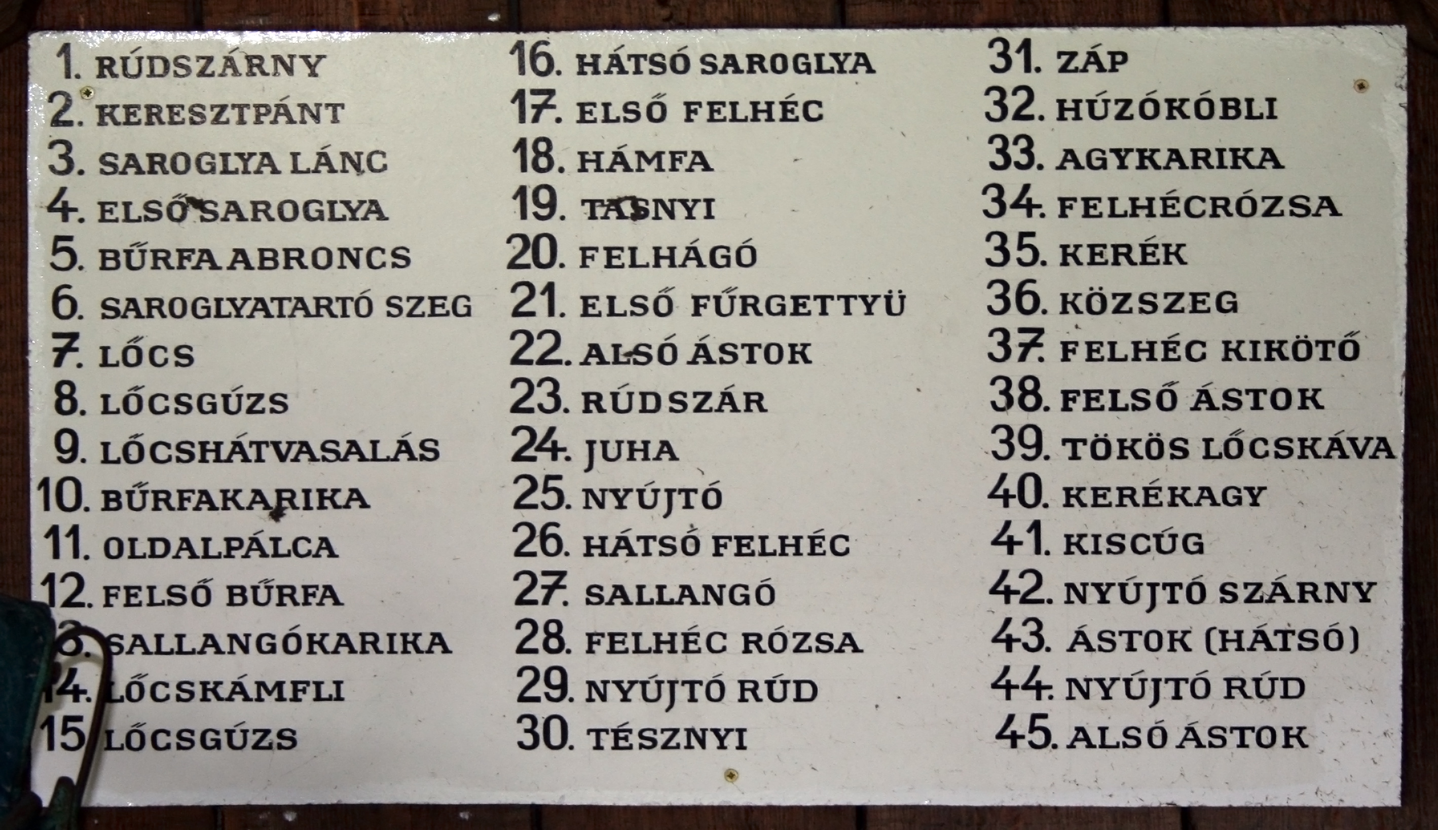 Jelmagyarázat a hagyományos szatmári szekerek szerkezeti rajzához, Szatmári Múzeum, Mátészalka